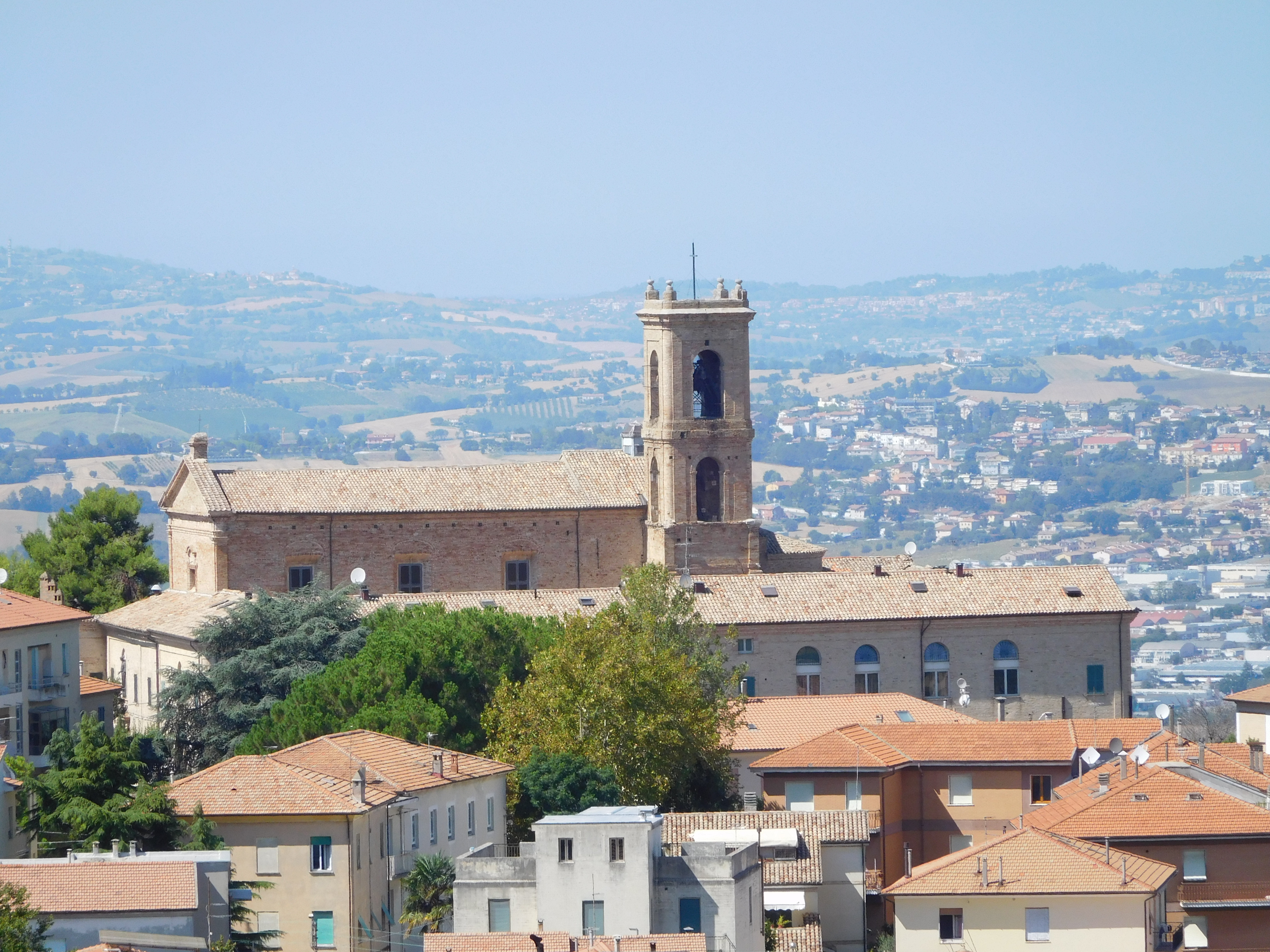 Recanati, Italia